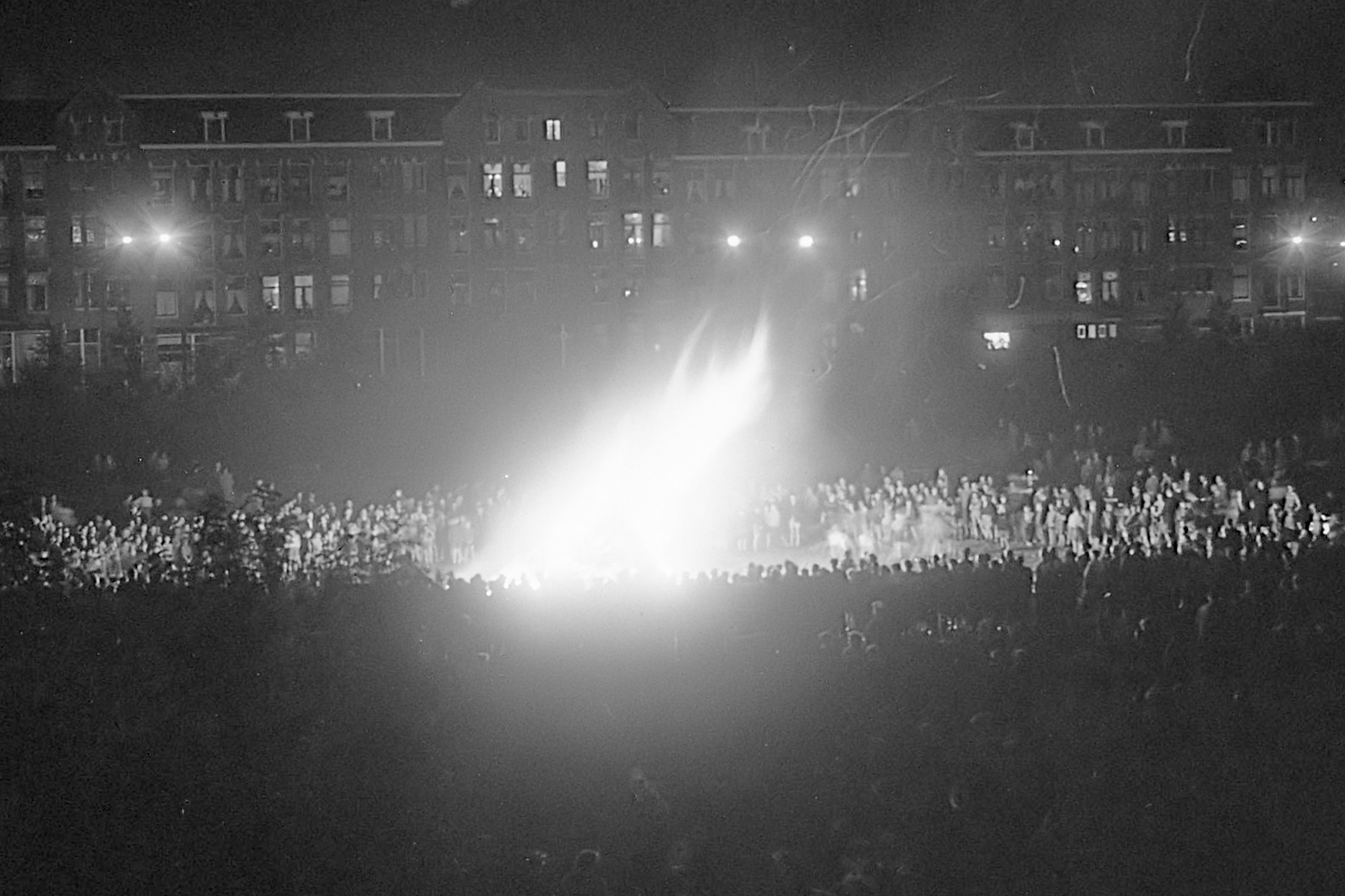 Hartjesdag in Amsterdam, officiele buurtvuur 15 augustus 1955